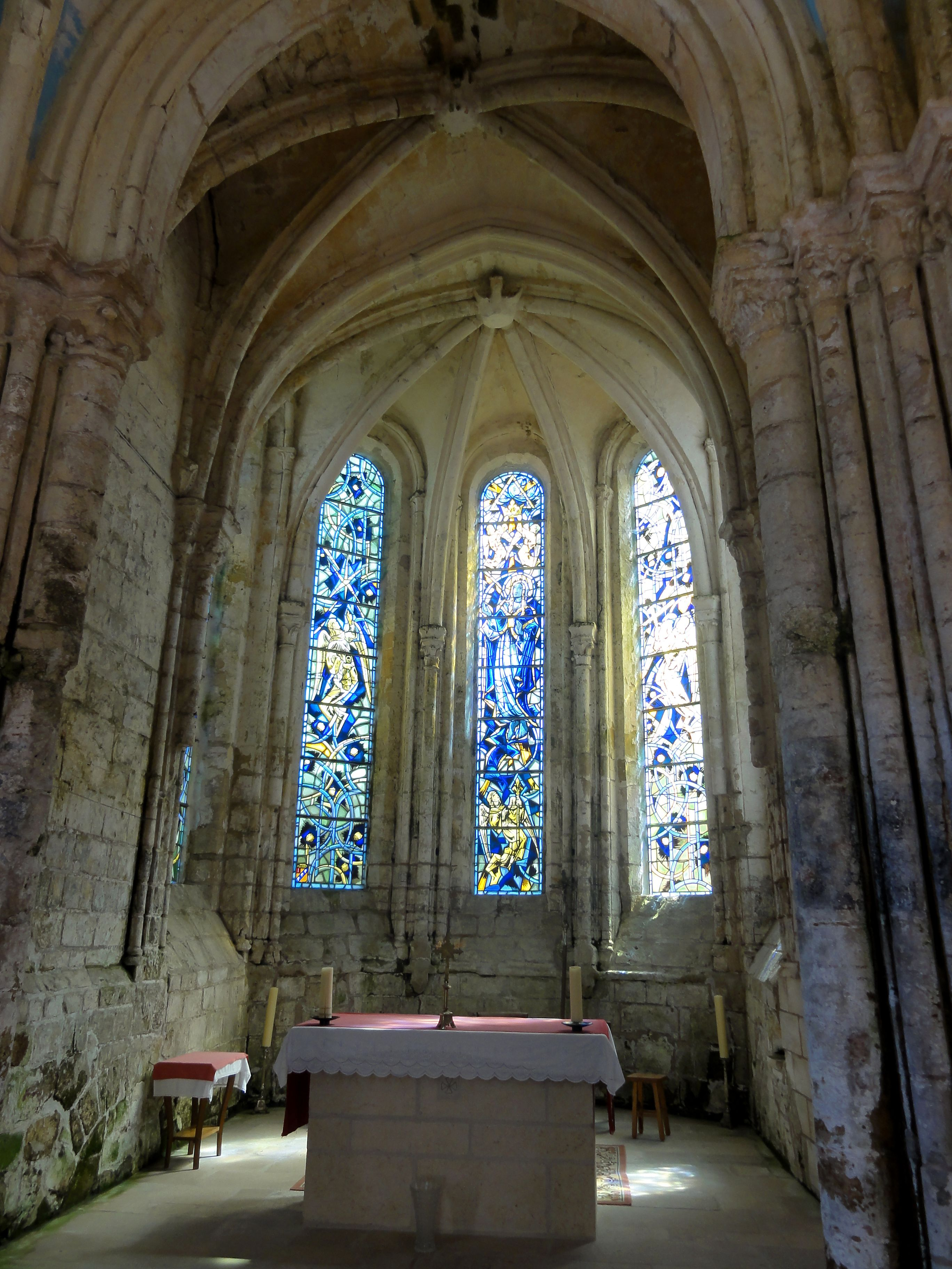 Abside.